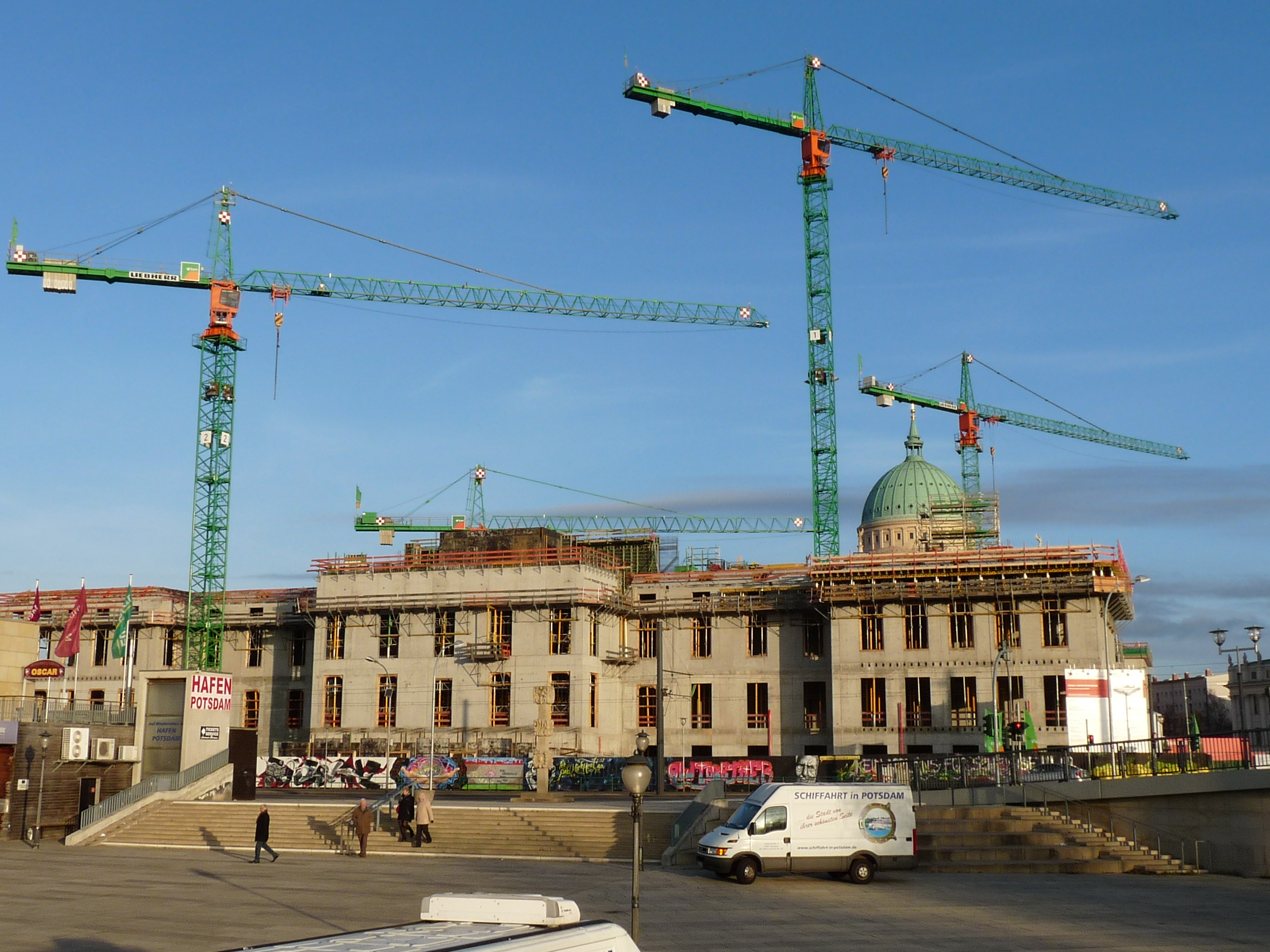 Stadtschloß Potsdam am 11. Dezember 2011